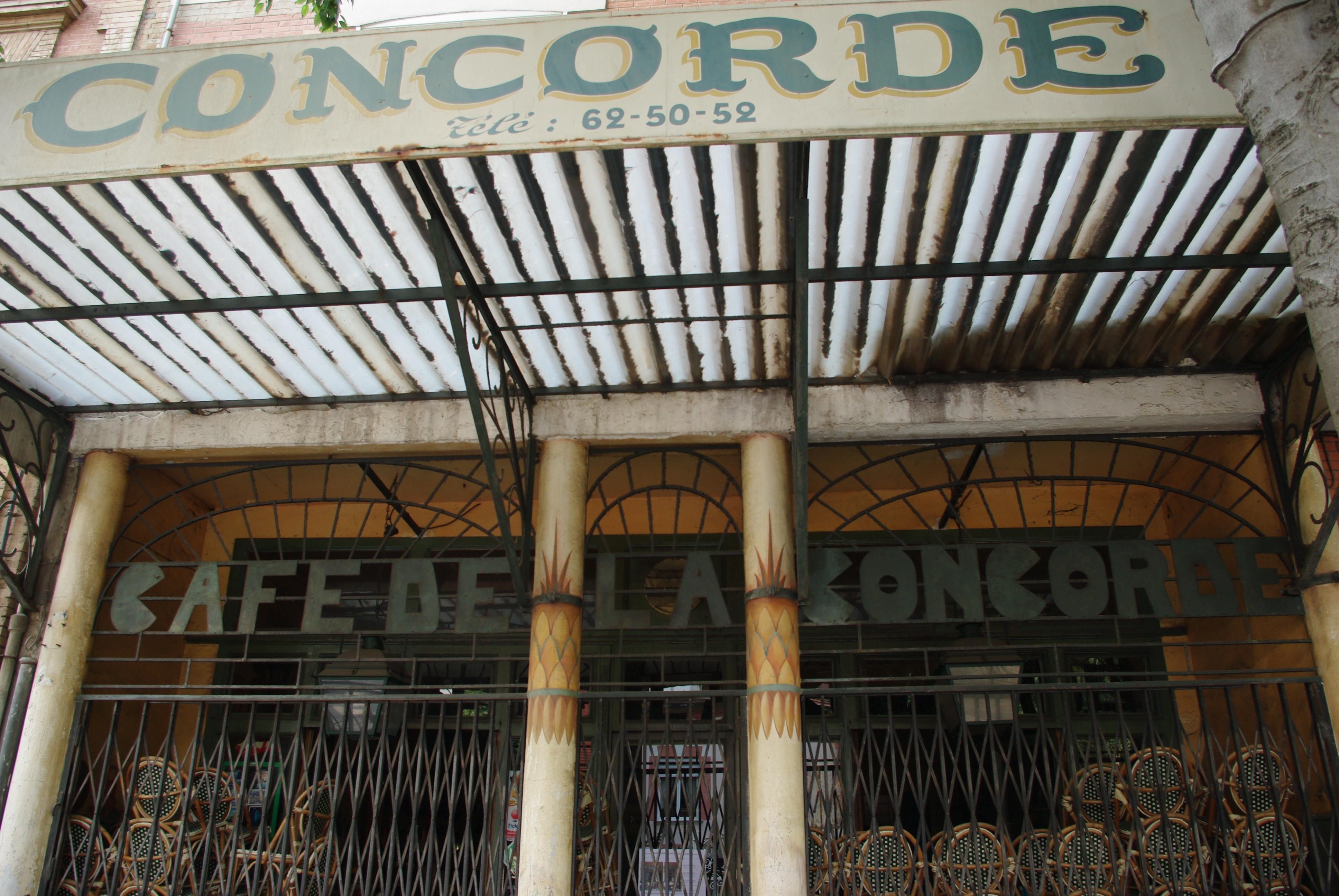 Le café de la Concorde à Toulouse, un jour de fermeture.